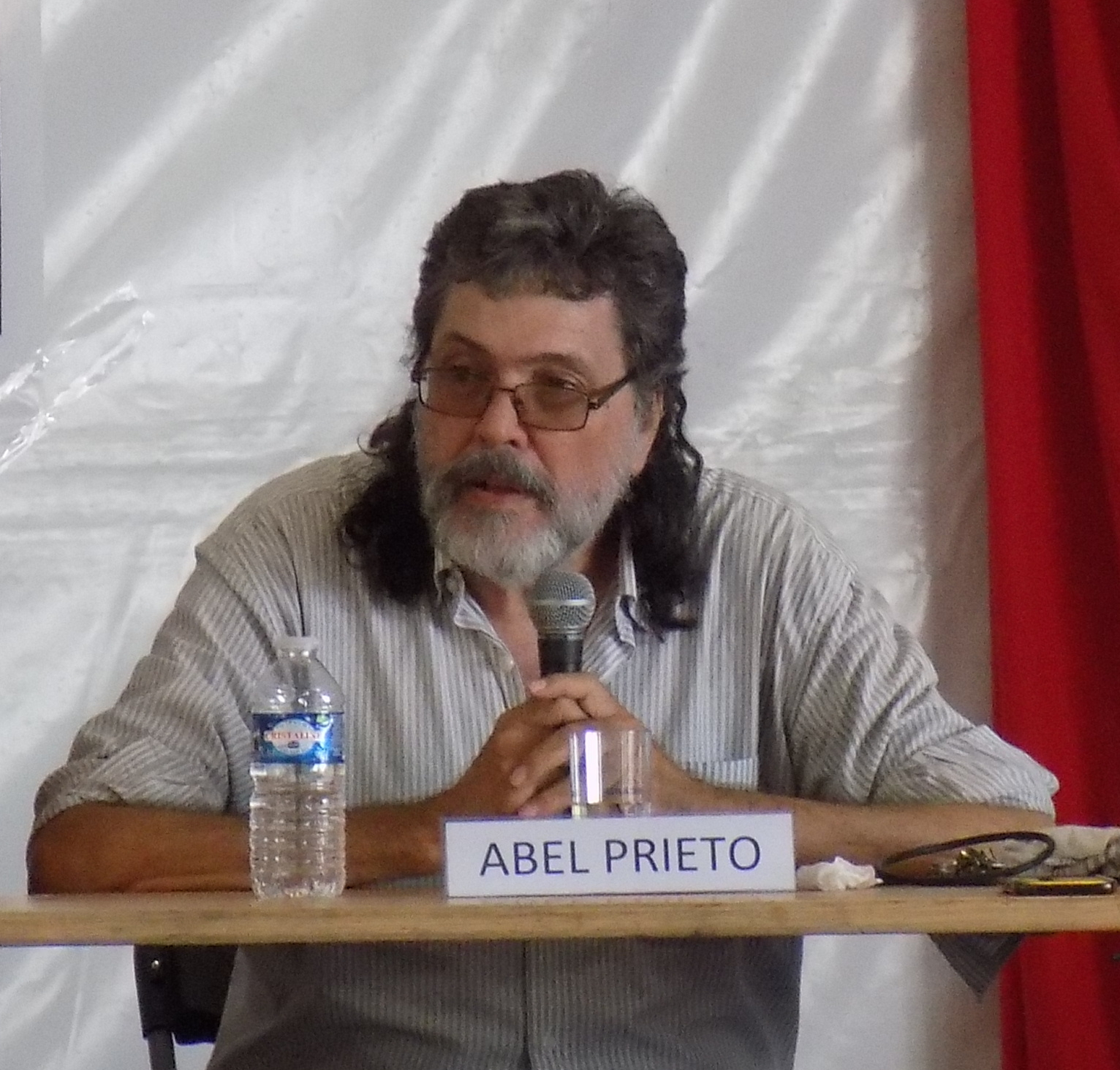 Abel Prieto lors d'un débat à la fête de l'Humanité le 14 septembre 2019